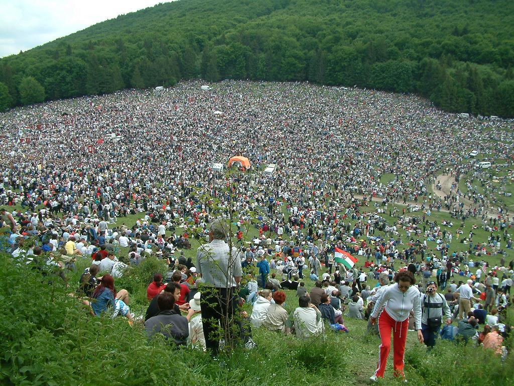 Búcsús tömeg a Nagy-Somlyó lábánál Csíksomlyón.